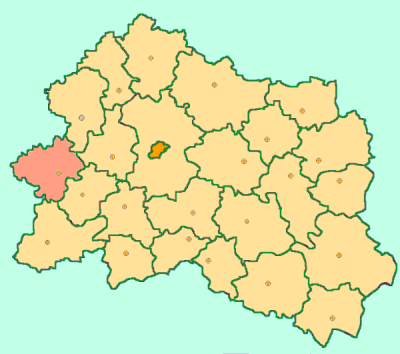 Orel Oblast map by Al Silonov Карта районов Орловской области